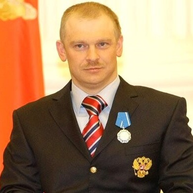 Сергей Валентинович Шилов, чемпион Паралимпийских игр